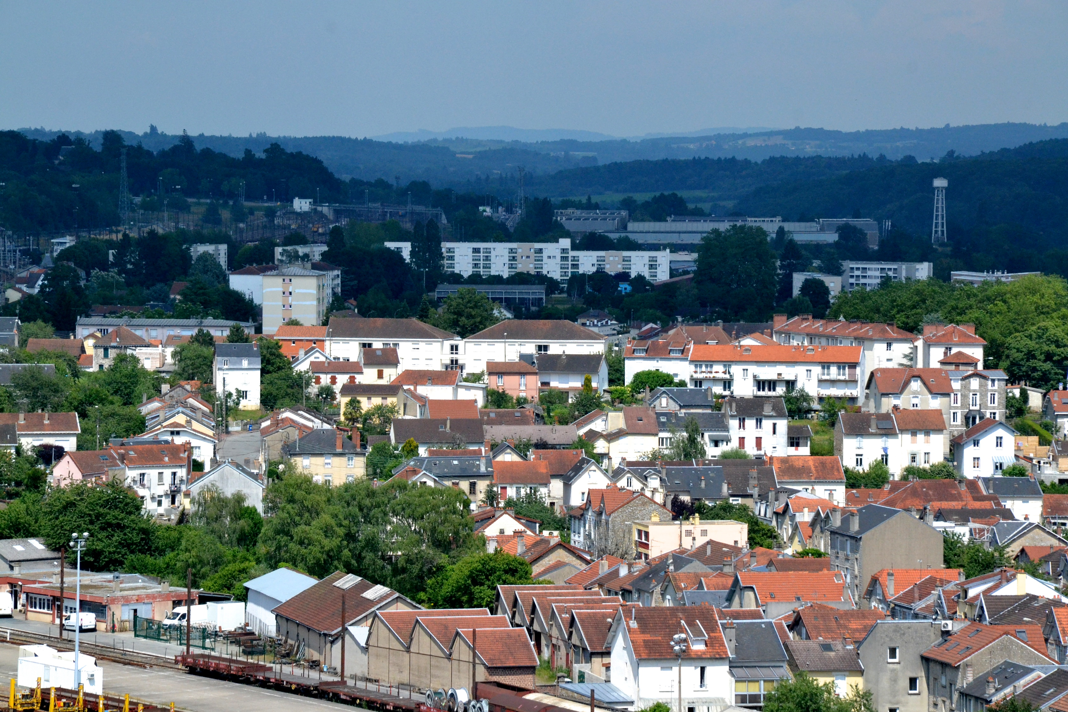 Quartier Montplaisir, Puy-Imbert et route du Palais puis vallée de la Vienne, vue depuis le campanile de la gare de Limoges.